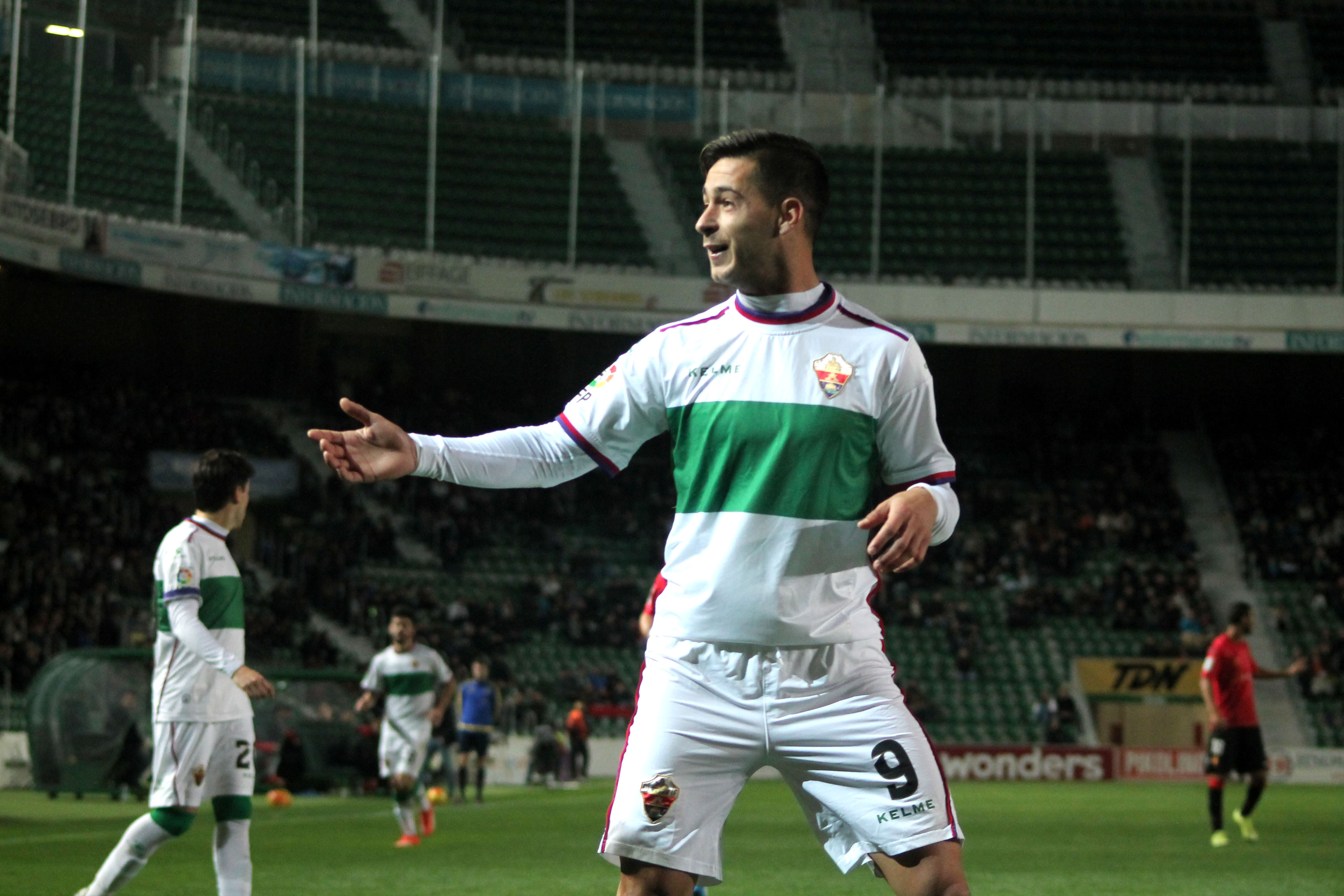 Elche vs Mallorca